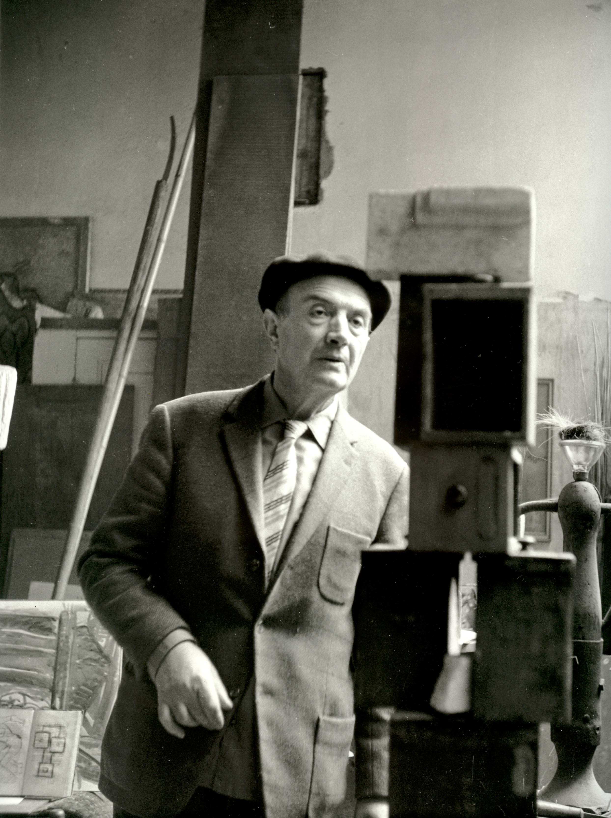 De beeldhouwer Ybe van der Wielen in zijn atelier aan de Ossenmarkt te Zwolle